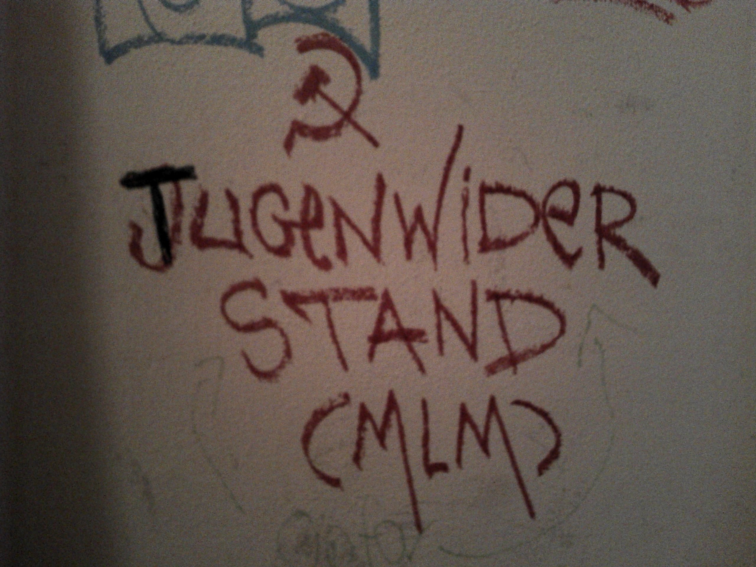 Schriftzug der gewalttätigen Berliner Gang "Jugendwiderstand" an einer Hauswand in 10999 Berlin-Kreuzberg, fotografiert am 10. November 2015. Mit Schreibfehler (ein "D" fehlt) und nachträglicher Verballhornung als "Tugen(d)widerstand".